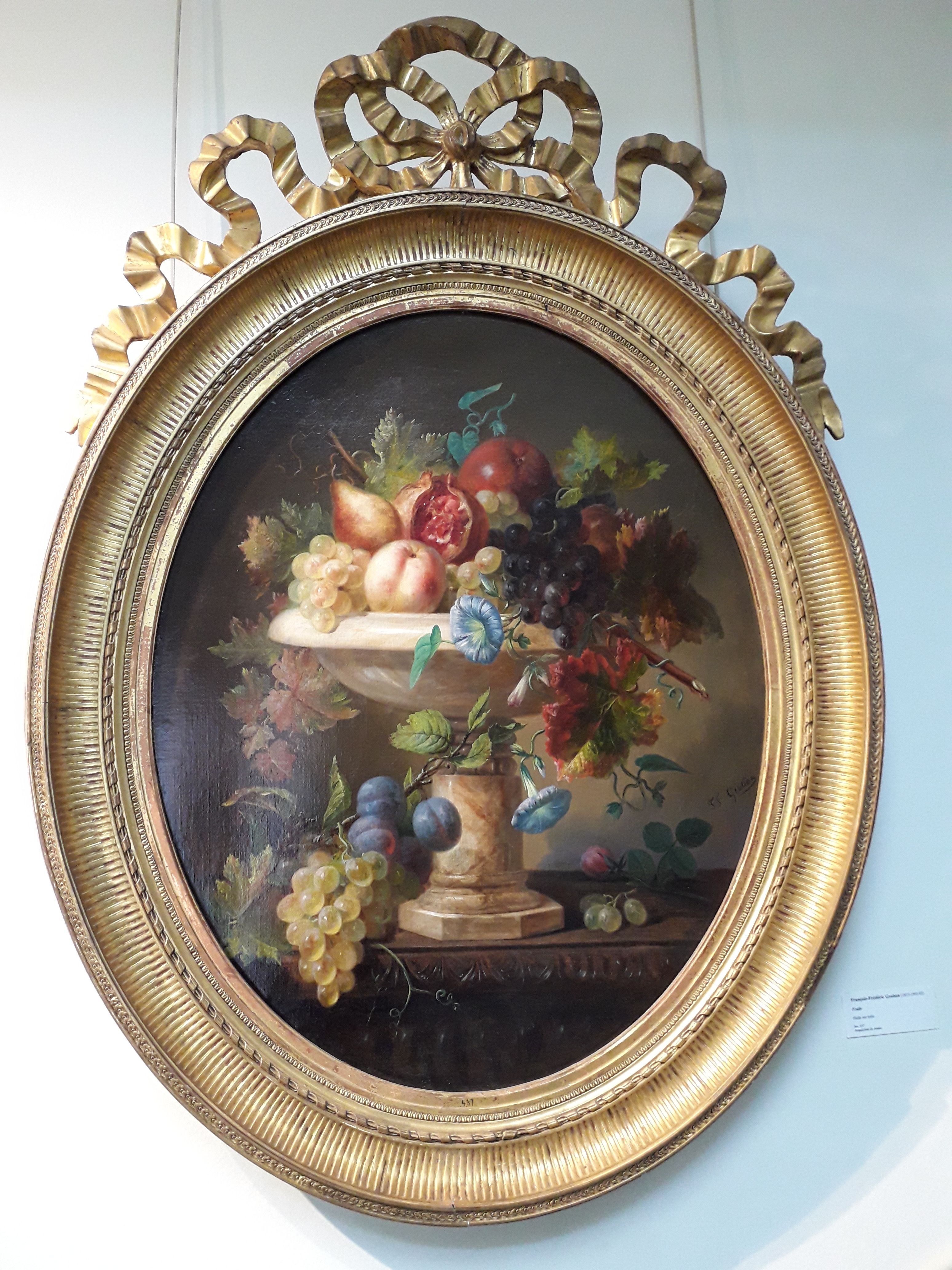 "Fruits", par François-Frédéric Grobon (né en 1815, mort en 1901/1902). Huile sur toile. XIXe siècle. Musée Bertrand, à Châteauroux, dans l'Indre, en France. Inv. 437. Acquisition du musée.